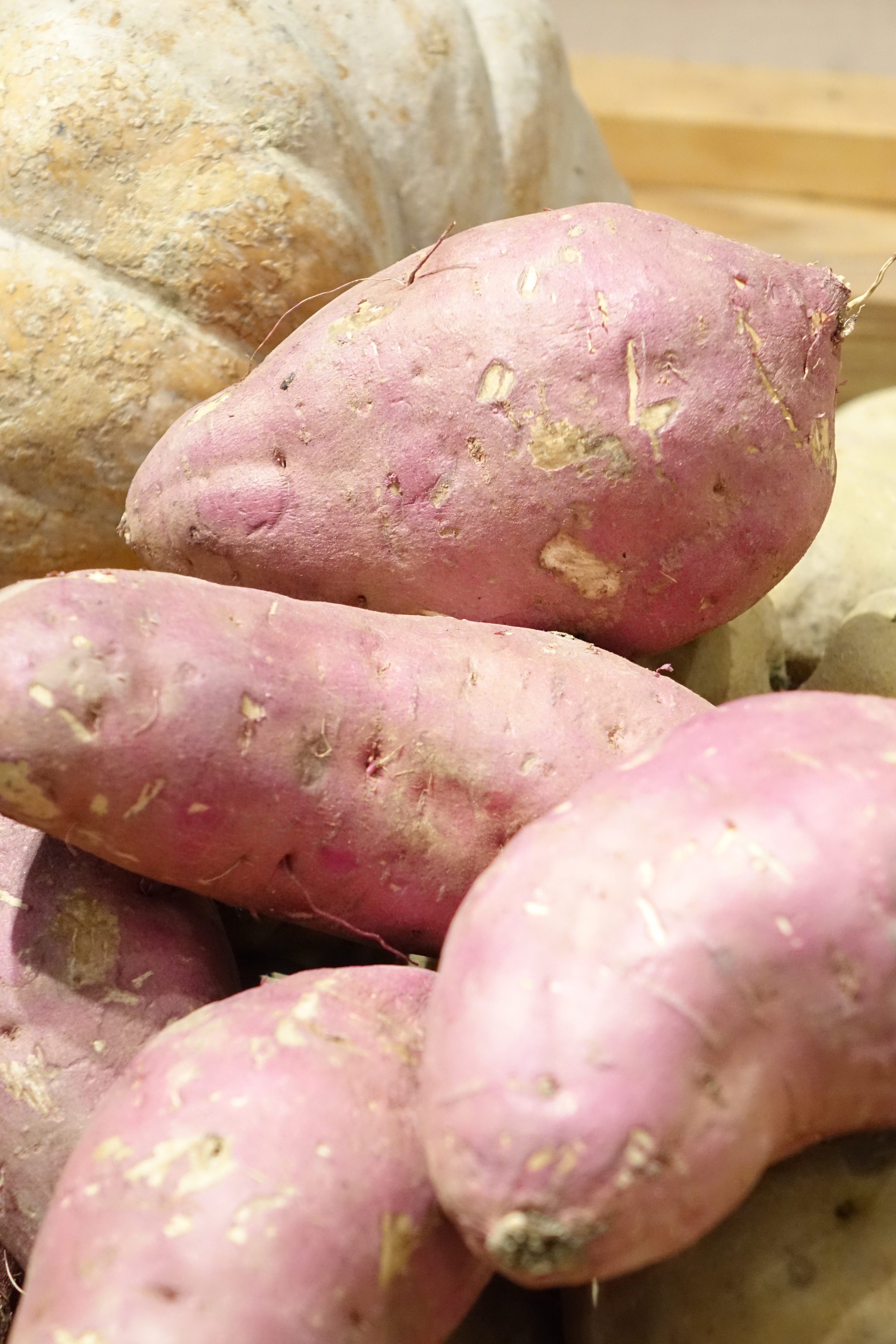 한국산 고구마, 2015년 3월 계절밥상 인사동점